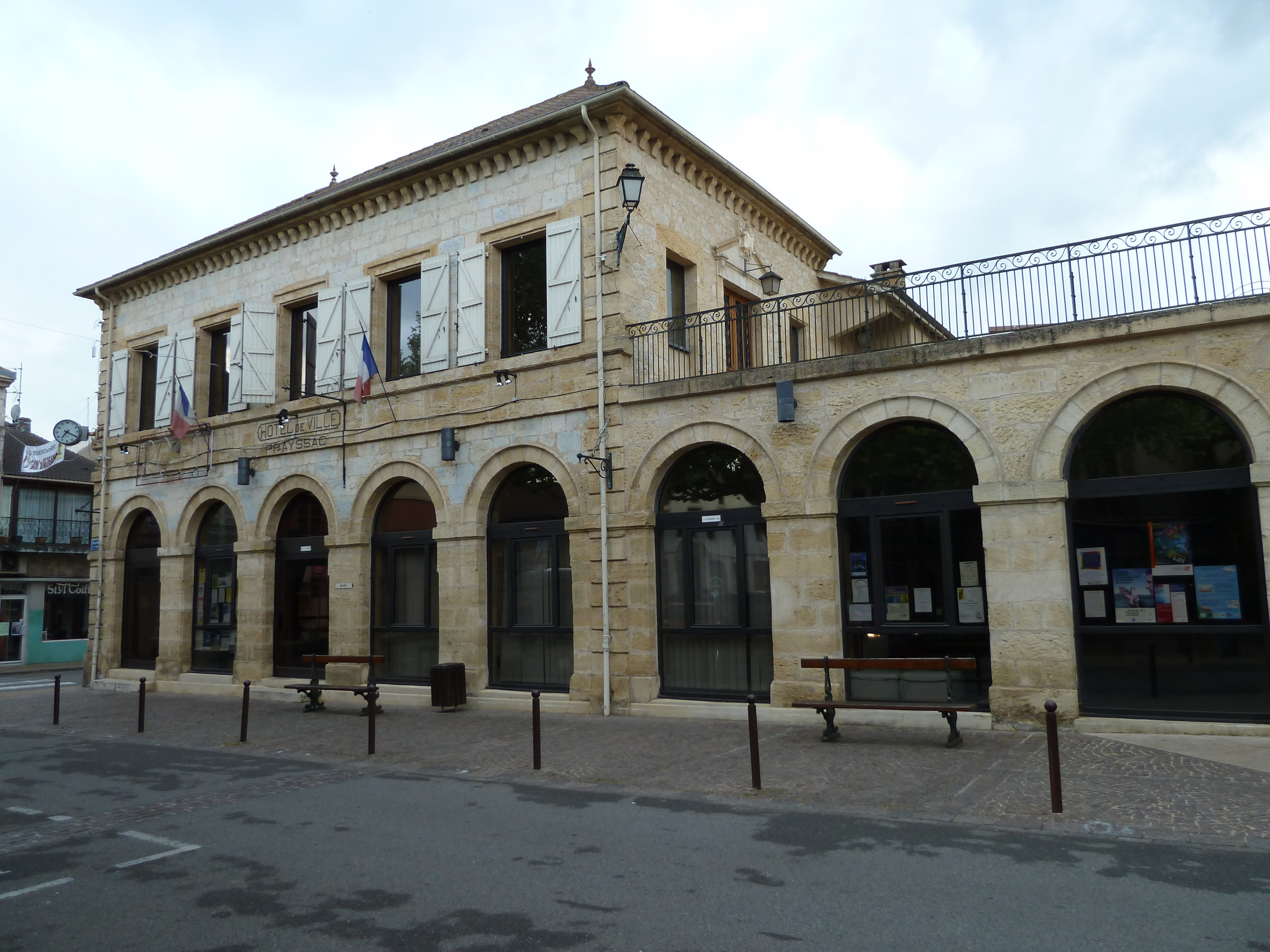 Mairie de Prayssac